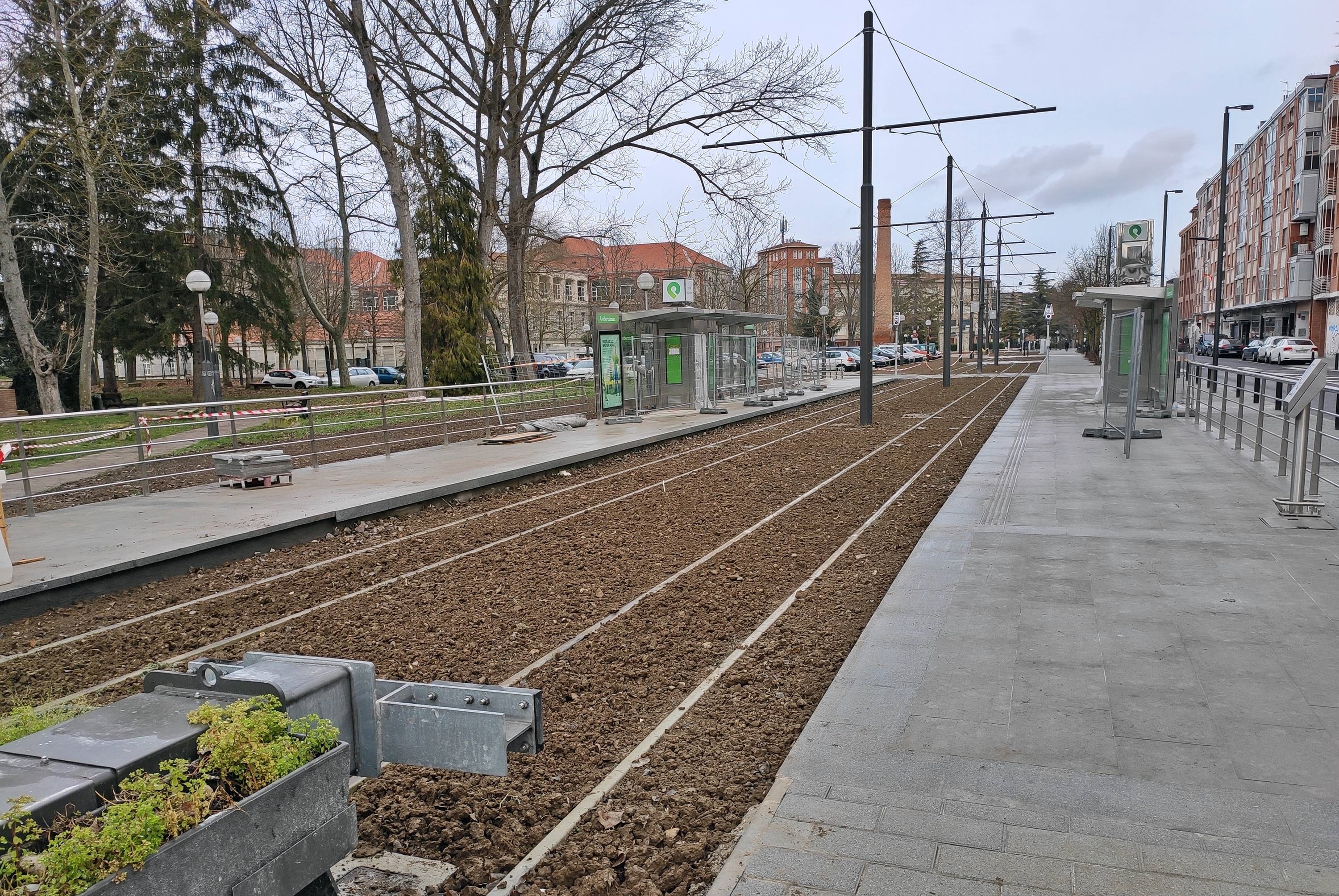 Parada Unibertsitatea